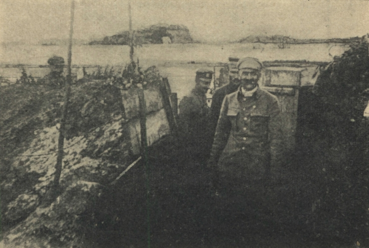 Józef Piłsudski w okopach. Za nim mjr Albin Fleszar.